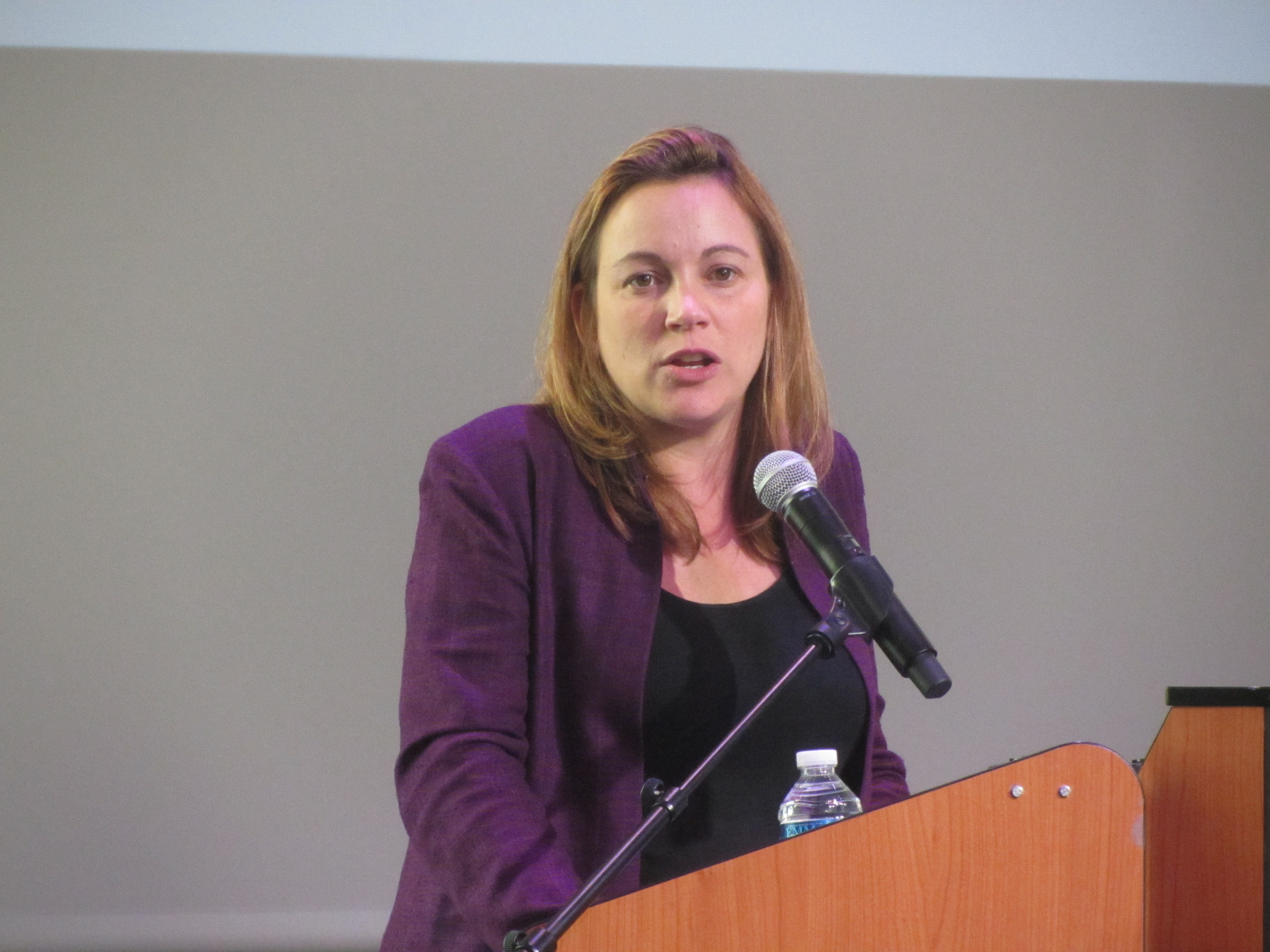 Axelle Lemaire, secrétaire d'Etat au numérique, lors de la clôture des Assises nationales de la médiation numérique, à la MRI de Caen. This document was produced using the Canon PowerShot SX230 HS lent by Wikimedia France.